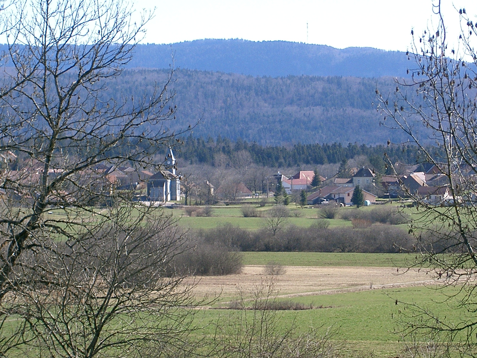 Le Vaudioux : village du département du Jura France (39)